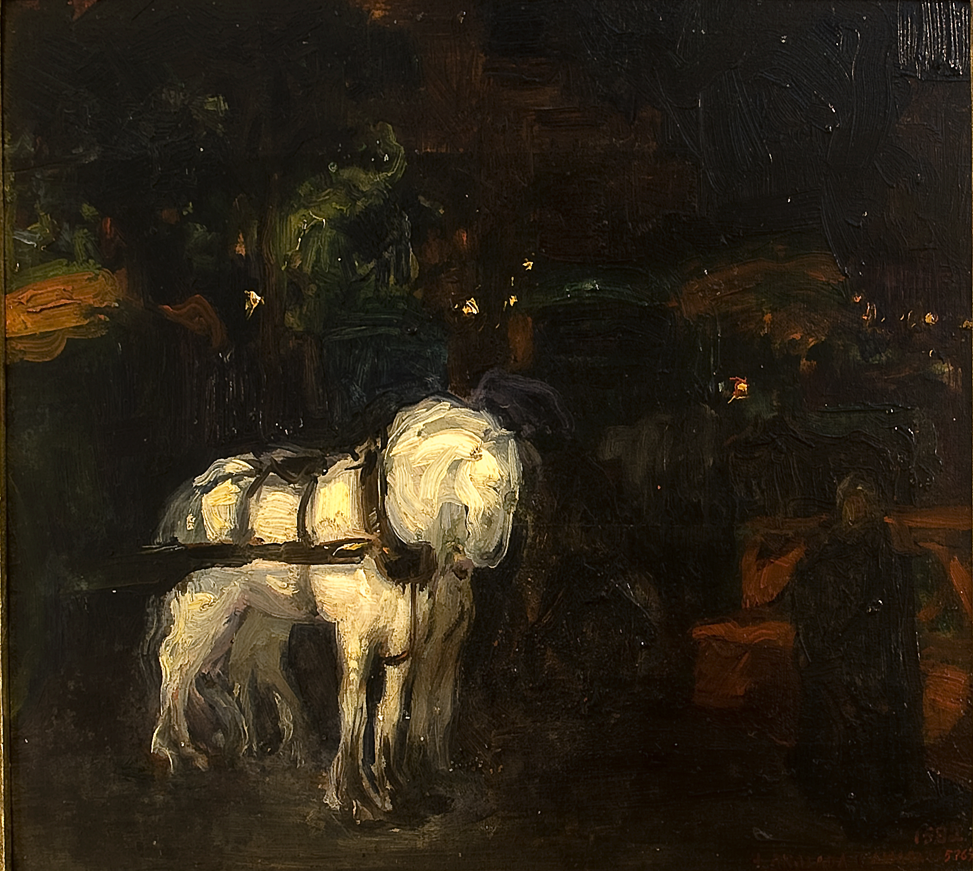 Efecte de nit-Estudi de cavalls. pintura sobre taula. Biblioteca Museu Víctor Balaguer